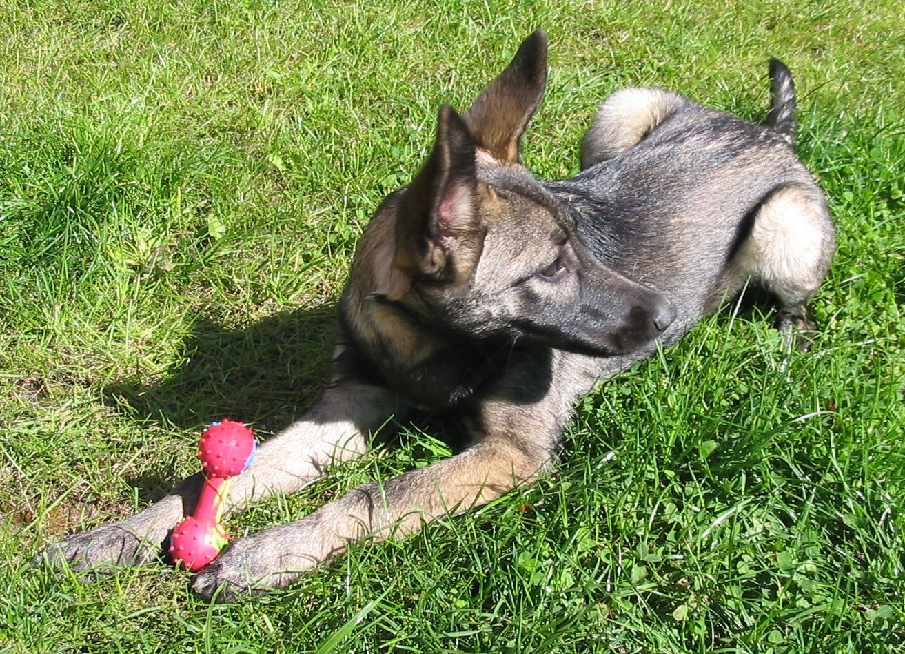 Foto di Lupo Italiano